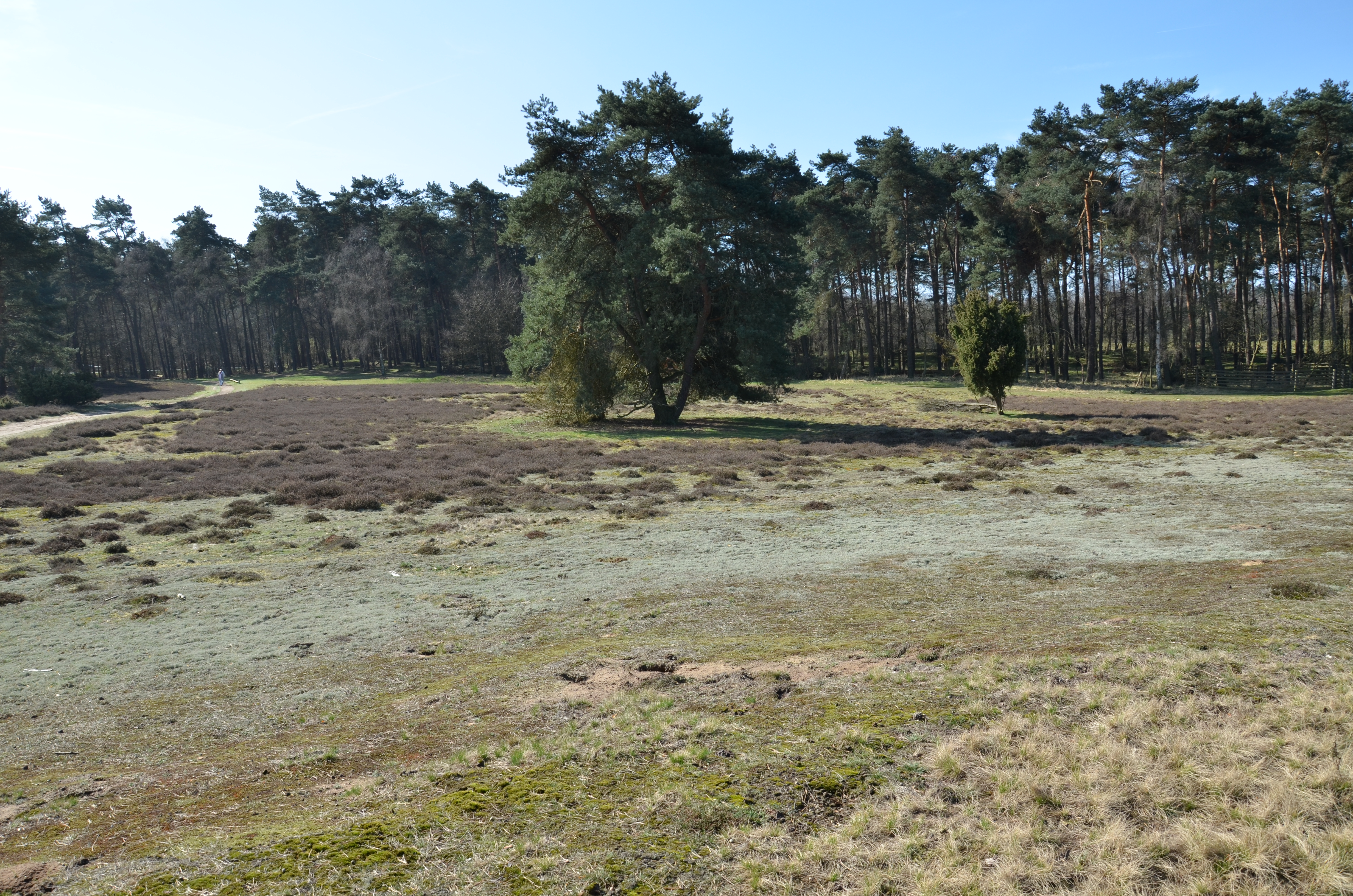 Westruper Heide in Haltern am See